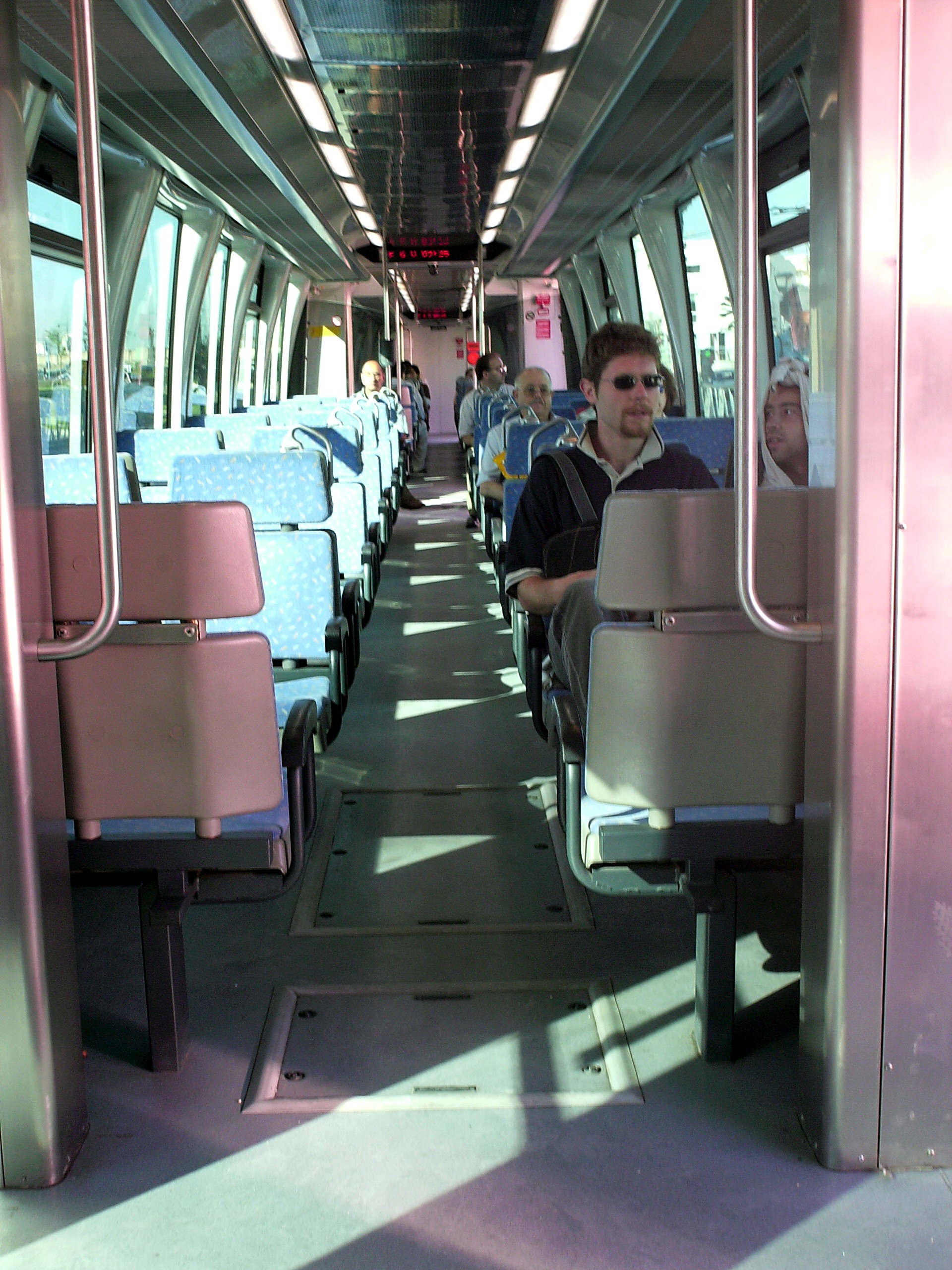 Innenraum eines auf der Linie L9 der Stadtbahn Alicante eingesetzten Triebwagens vom Typ MAN 2500 / Interior de un MAN 2500 de la línea L9 del TRAM Metropolità d'Alacant